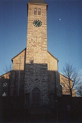 Turm der Pfarrkirche Wollaberg